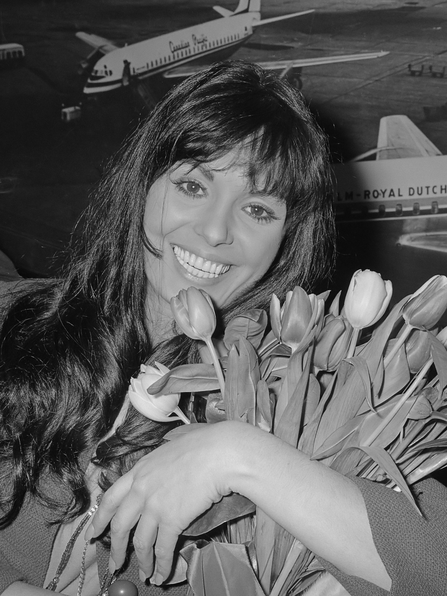 Filmster Daliah Lavi op Schiphol, Opdracht Columbia, in perskamer 28 maart 1966